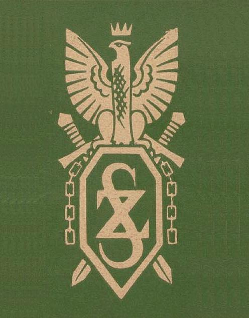 Znak Związku Sybiraków (1939)